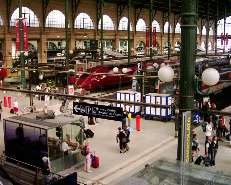 Der Hochgeschwindigkeitszug Thalys im Paris Kopfbahnhof "Gare du Nord".